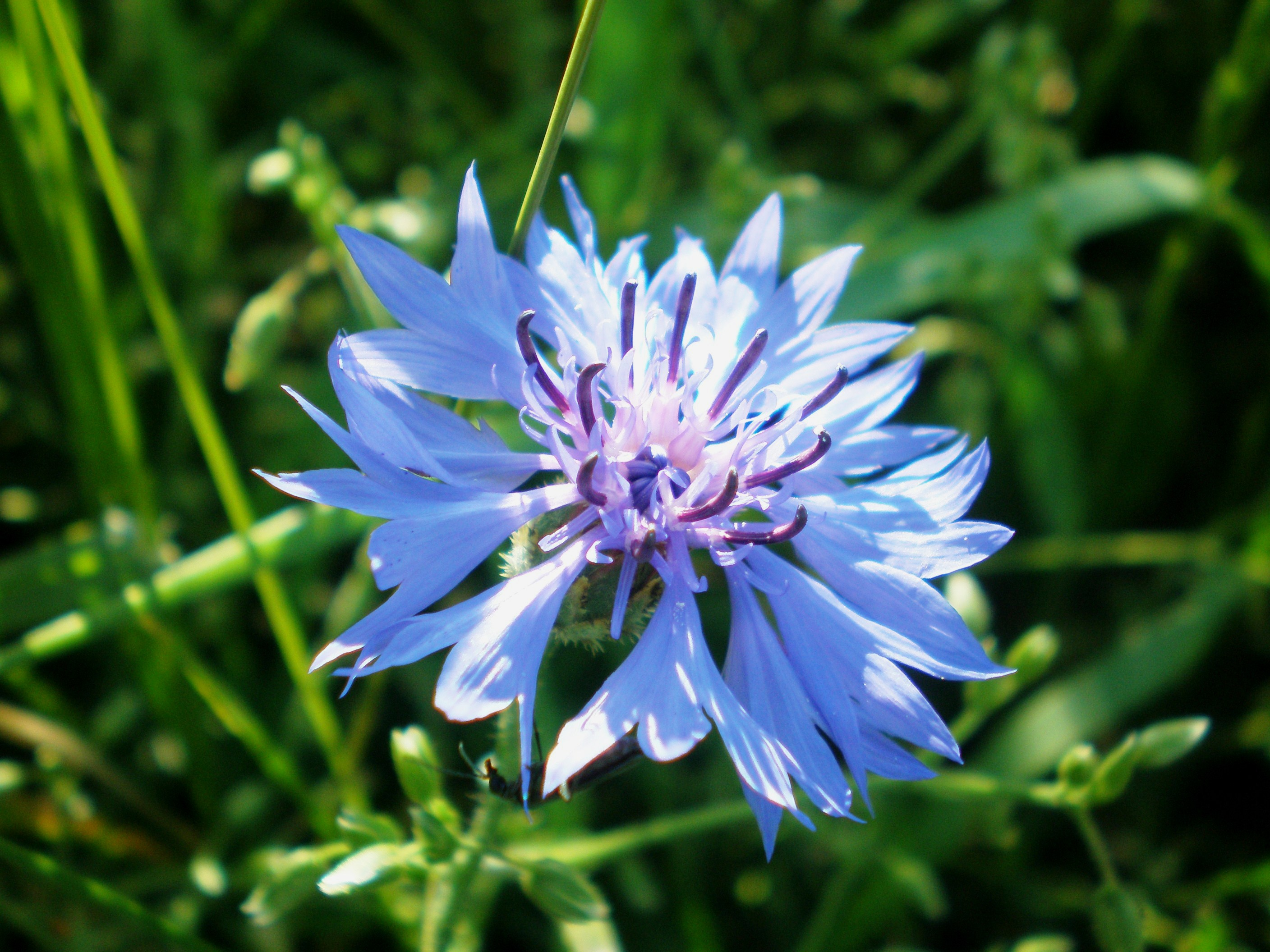 Centaurea cyanus